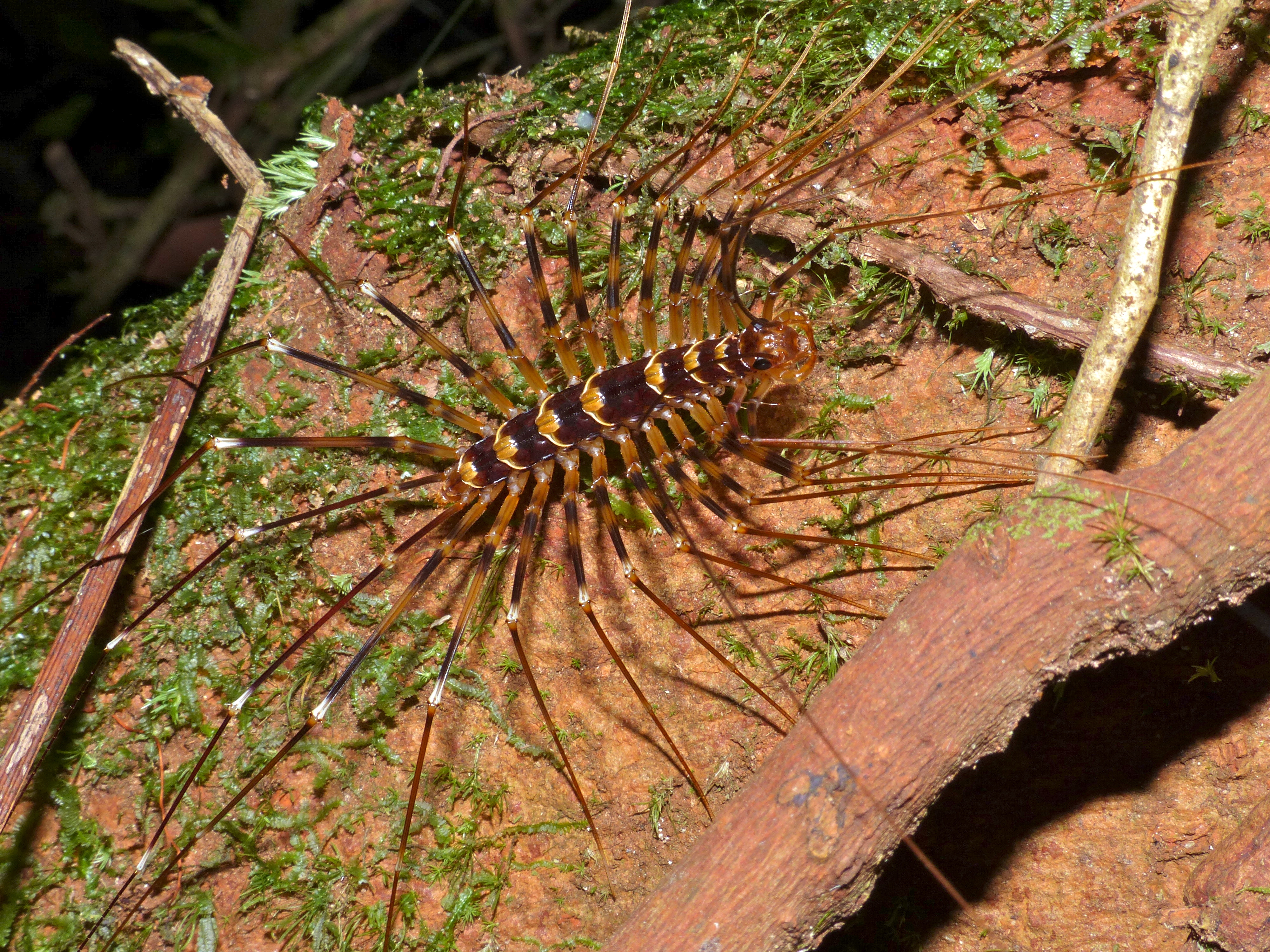 Night Walk Trail, Mulu NP, Sarawak, MALAYSIA